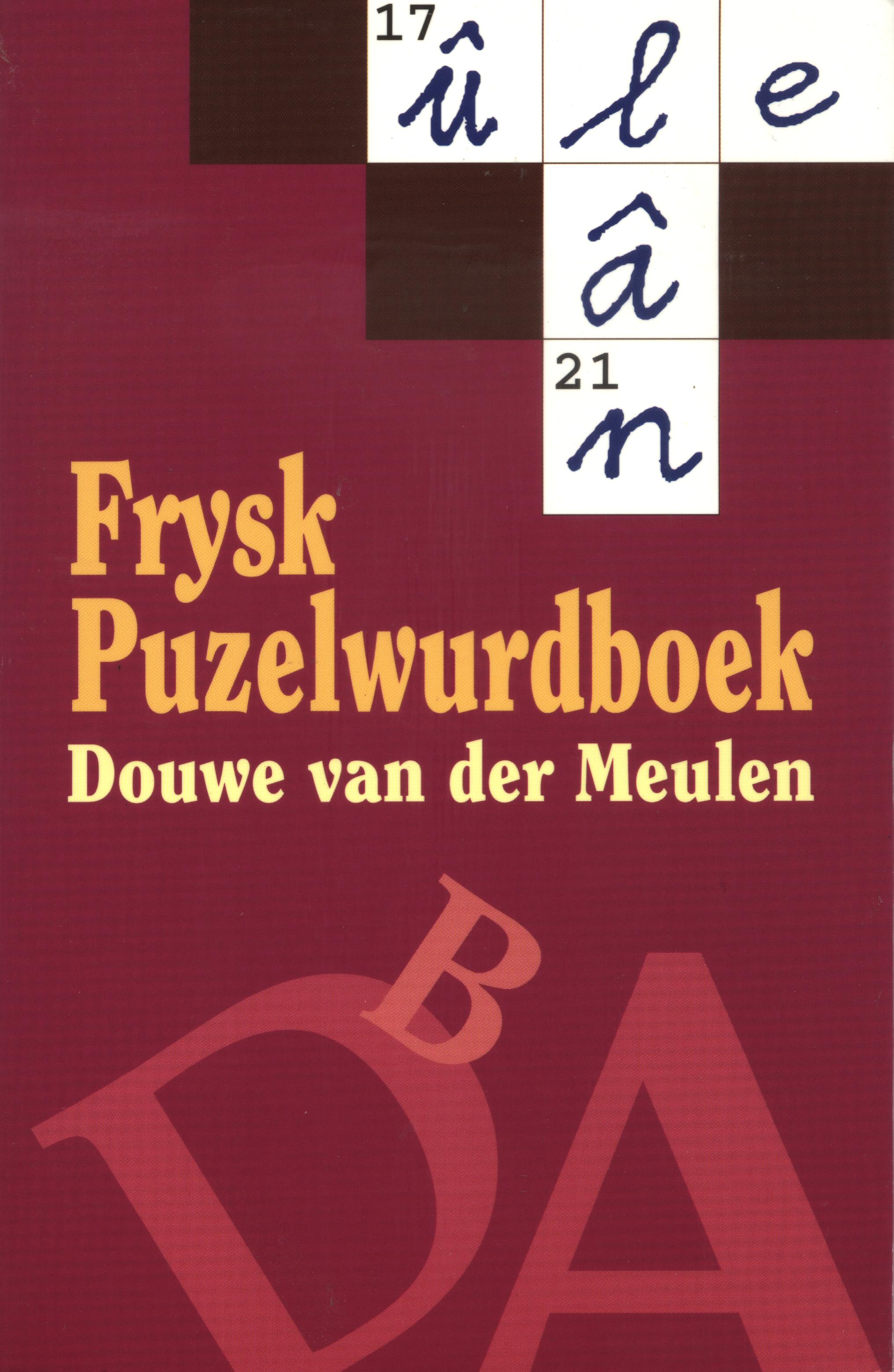 Frysk Puzelwurdboek, Koarte ynhâld, rjochten frijjûn troch de Afûk op 27 oktober 2008